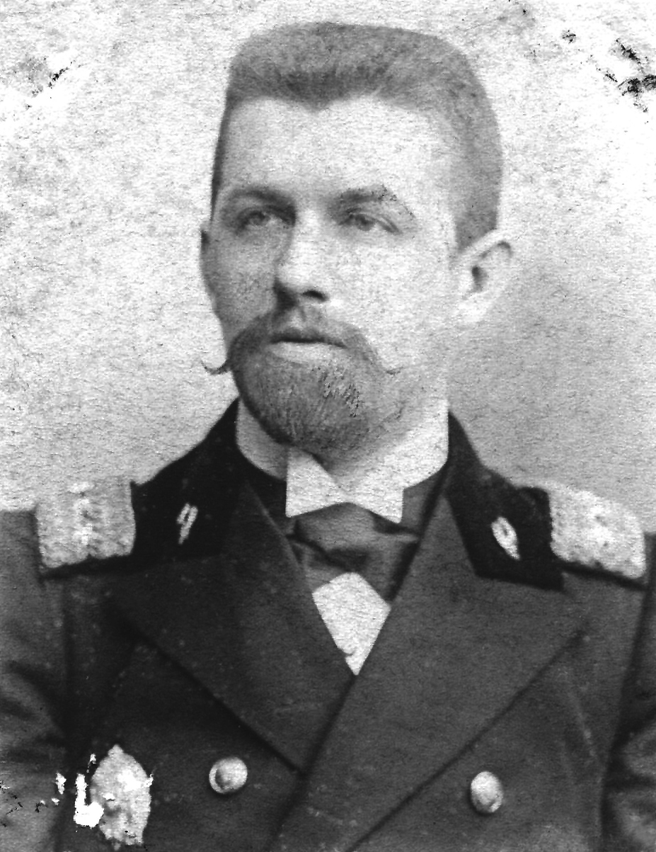 Петербургский архитектор Карл Шмидт в мундире чиновнике Министерства юстиции. 1897 год